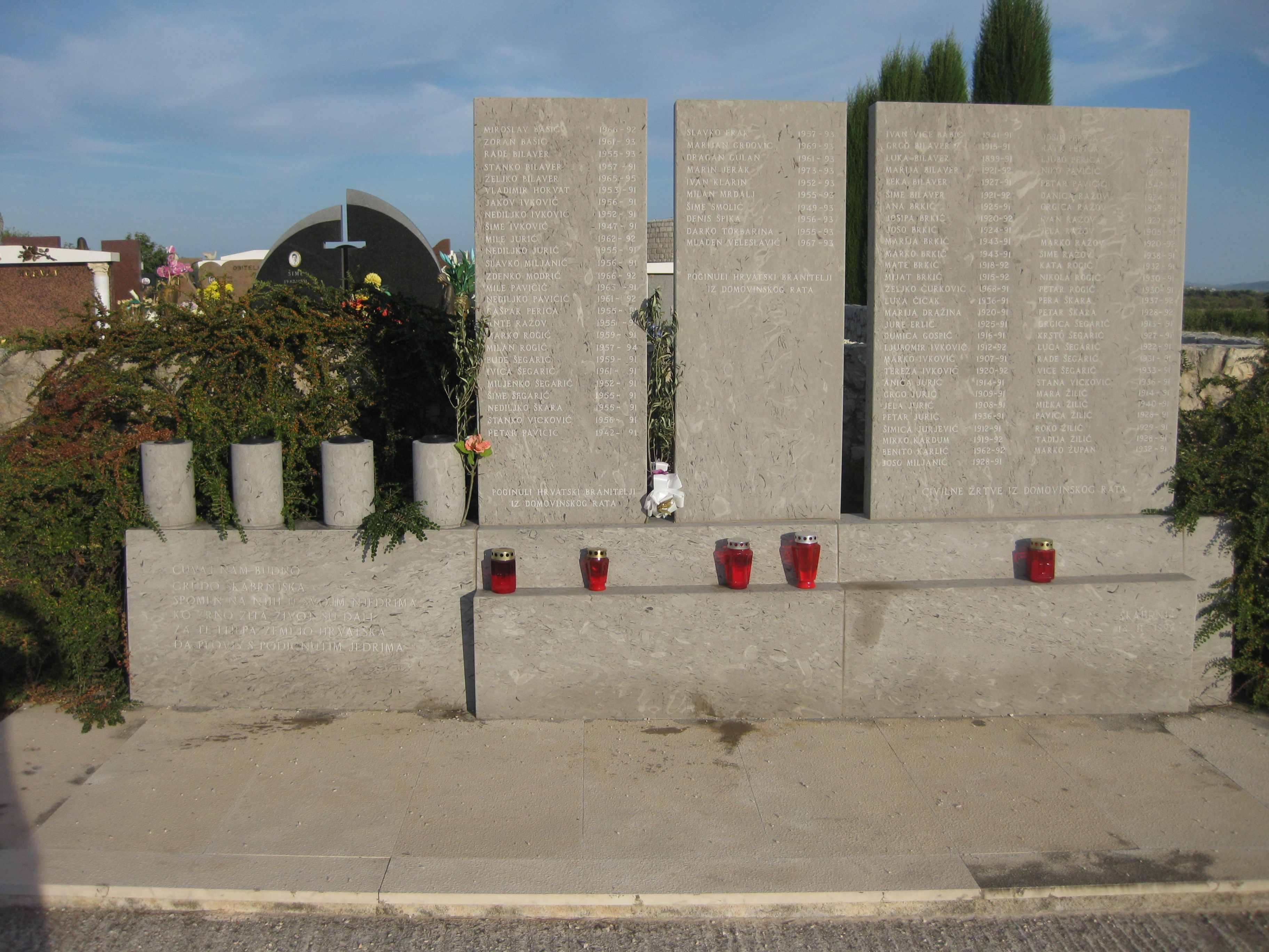 Spomenik zrvtvama Velikosrpske Agresije na Hrvatsku u Skabrinji